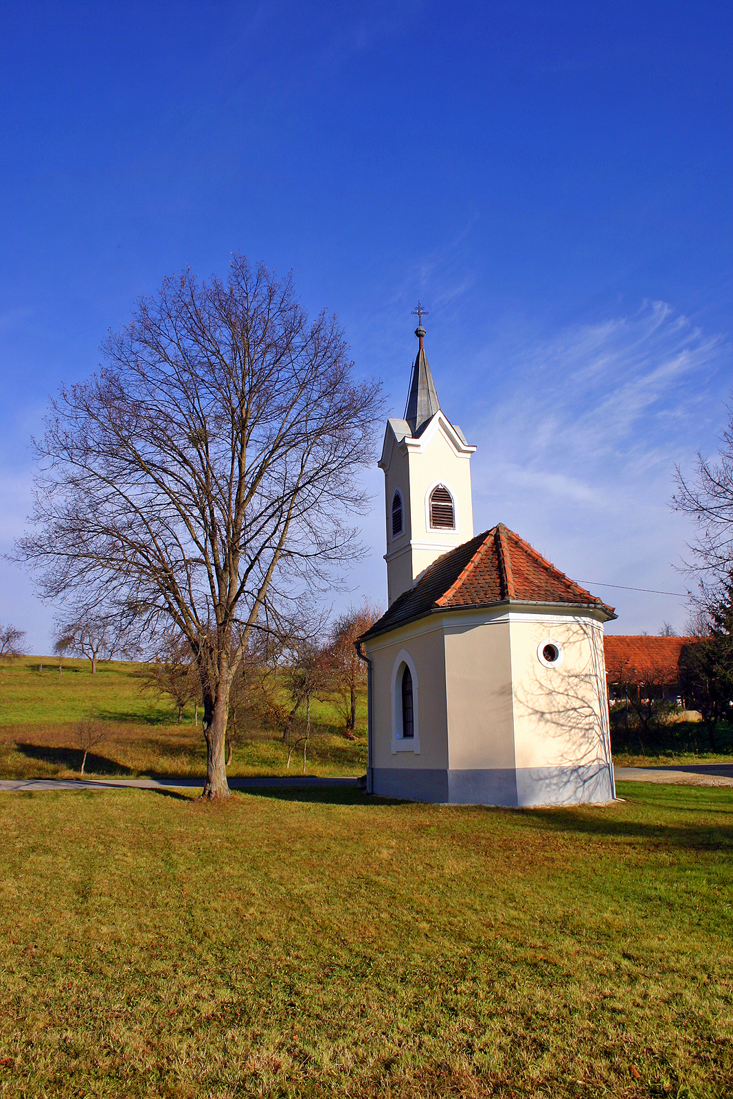 Kapela Svetega križa, Bukovnica. Holy cross chapel, Bukovnica. Heilig-Kreuz-Kapelle, Bukovnica.